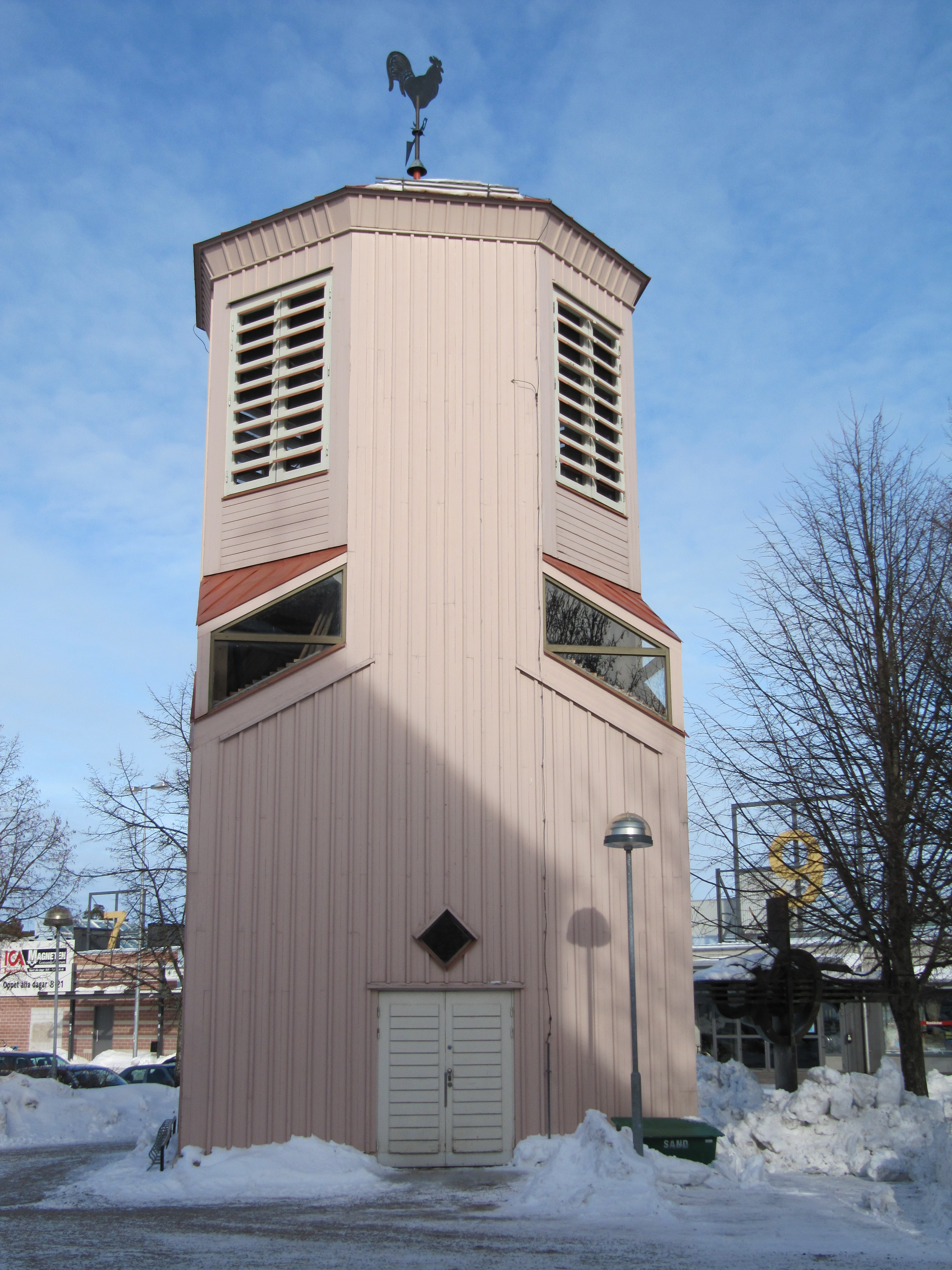 Klockstapel vid Gottsunda kyrka